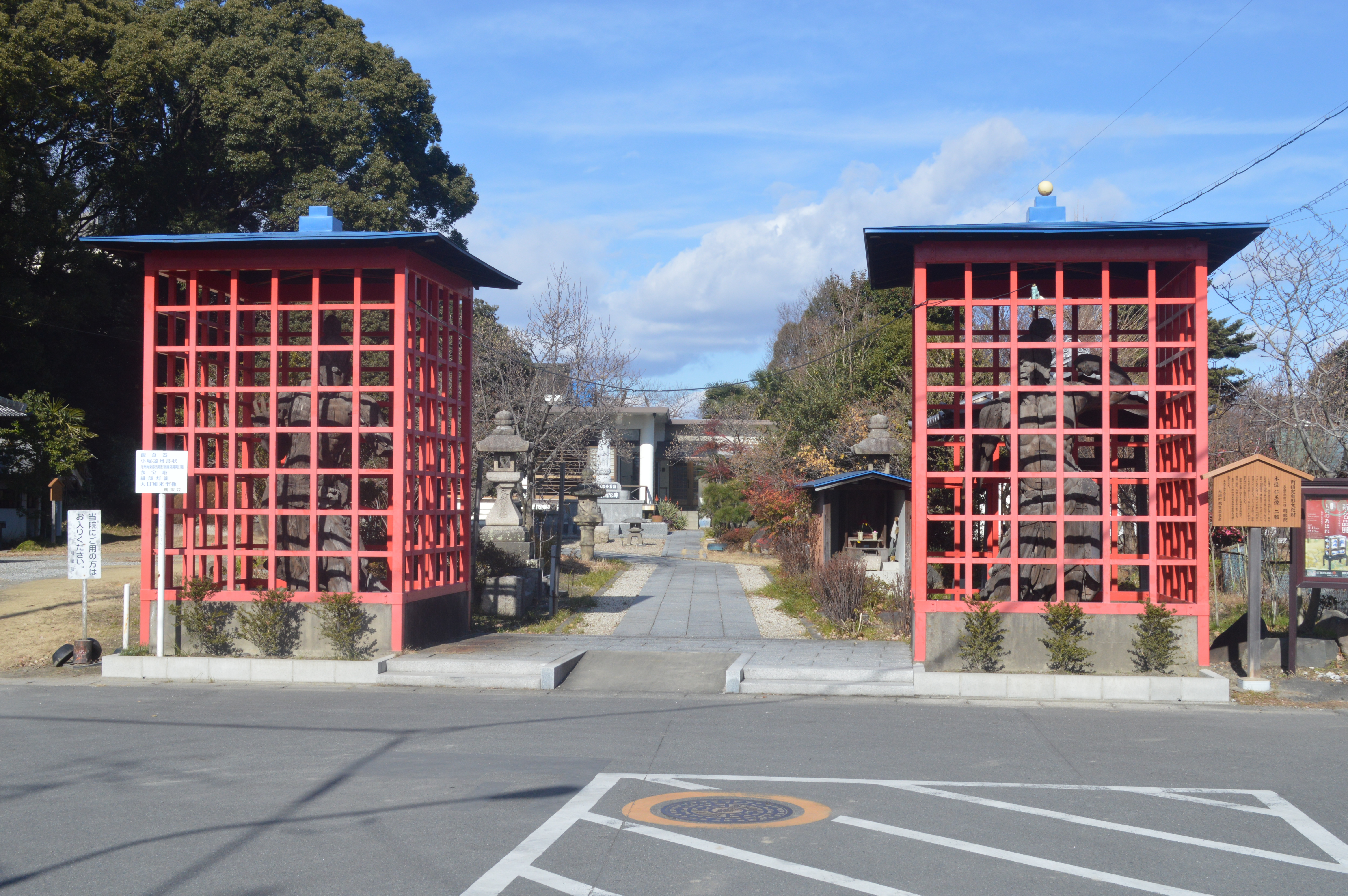 愛知県海部郡大治町の明眼院。木造仁王像。